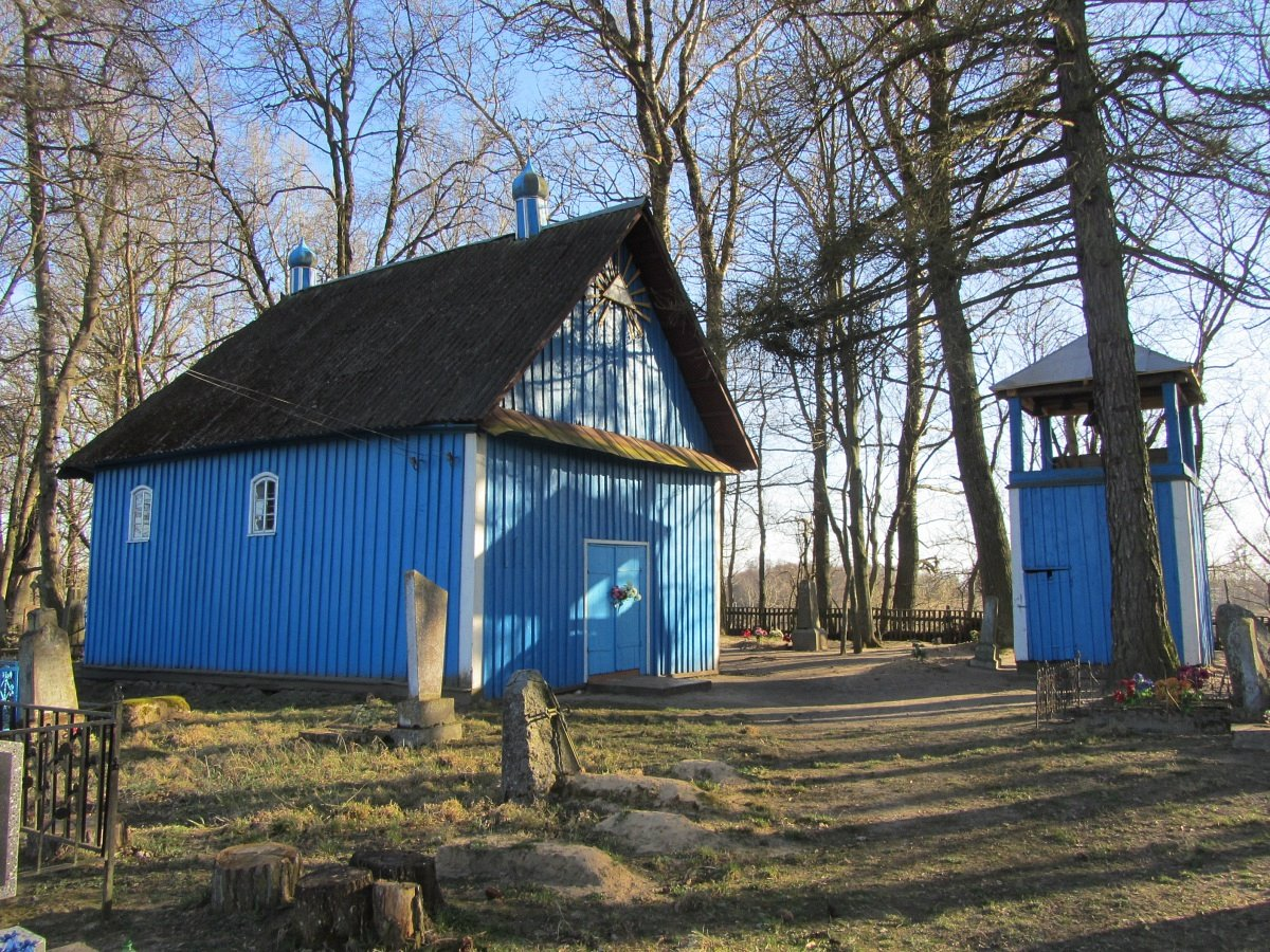 Зарэчча. Свята-Петра-Паўлаўская царква са званіцай